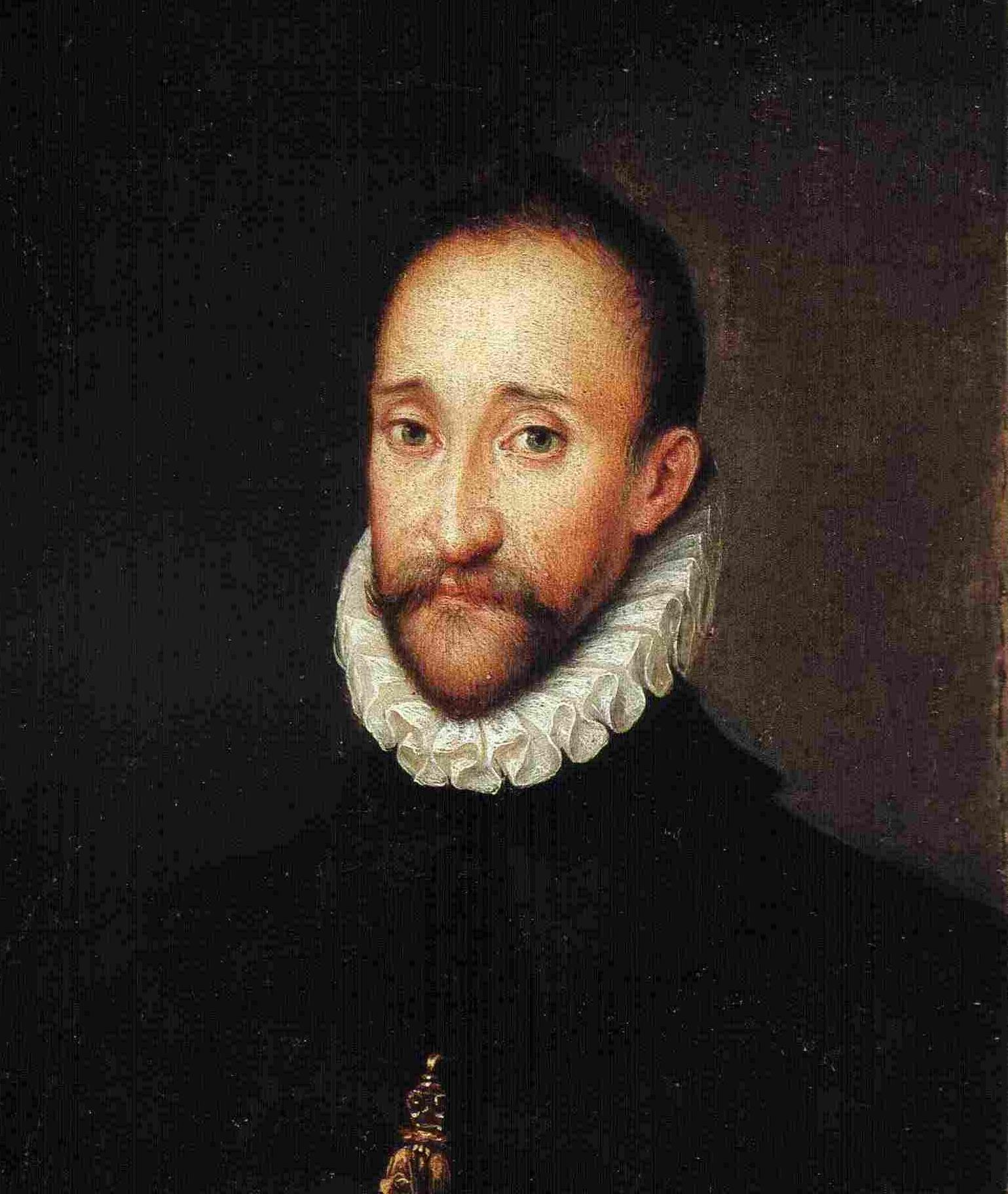 Ottavio Farnese (1521-1586), secondo duca di Parma